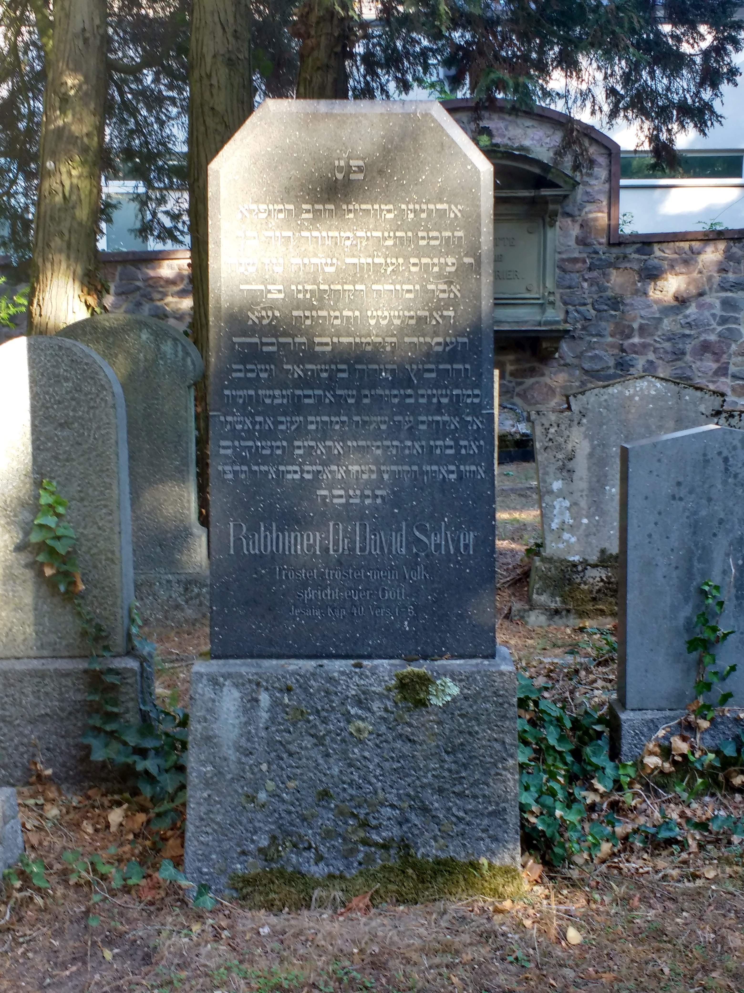 David Selver (1856-1926)